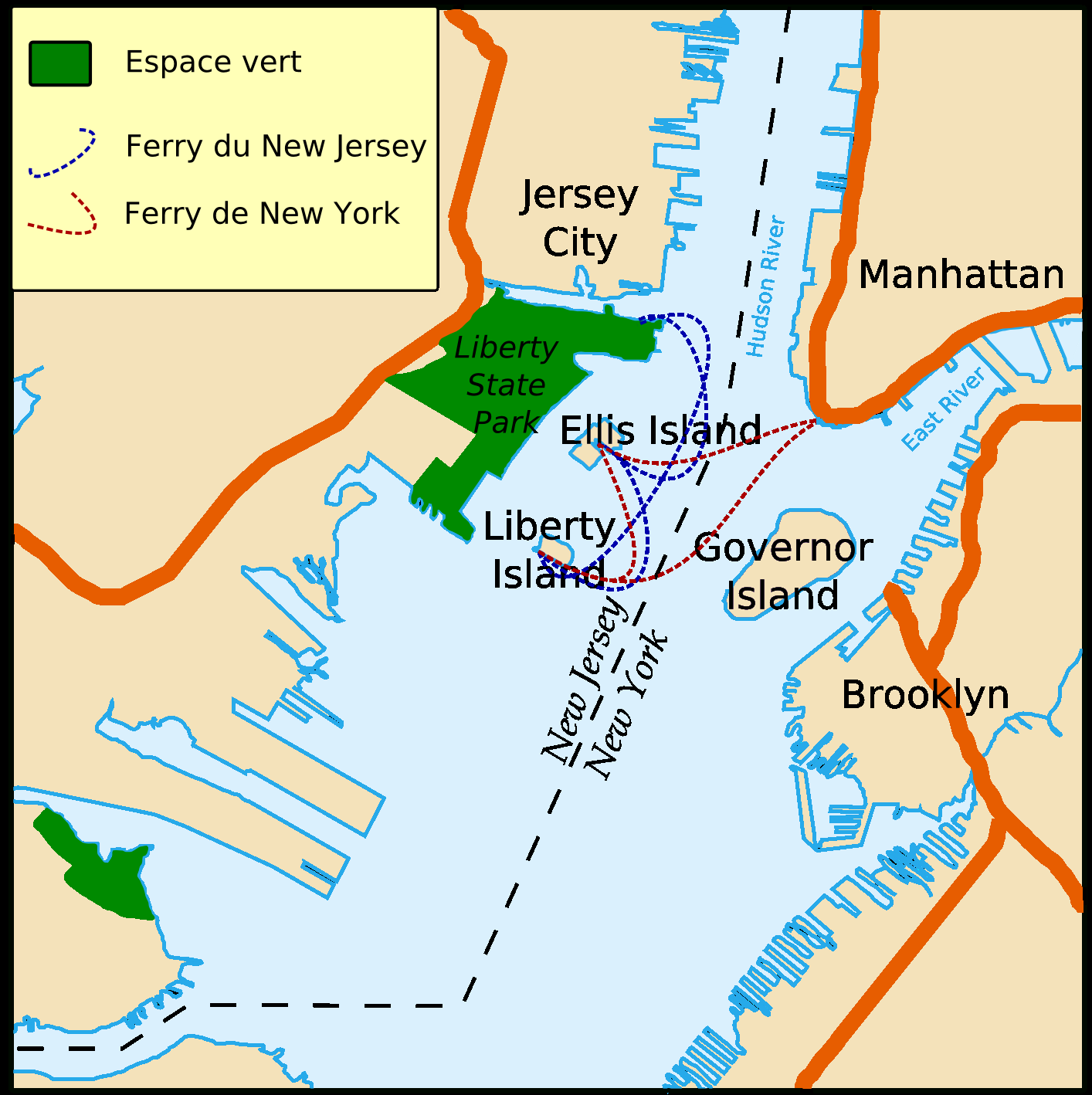 Localisation statue liberté